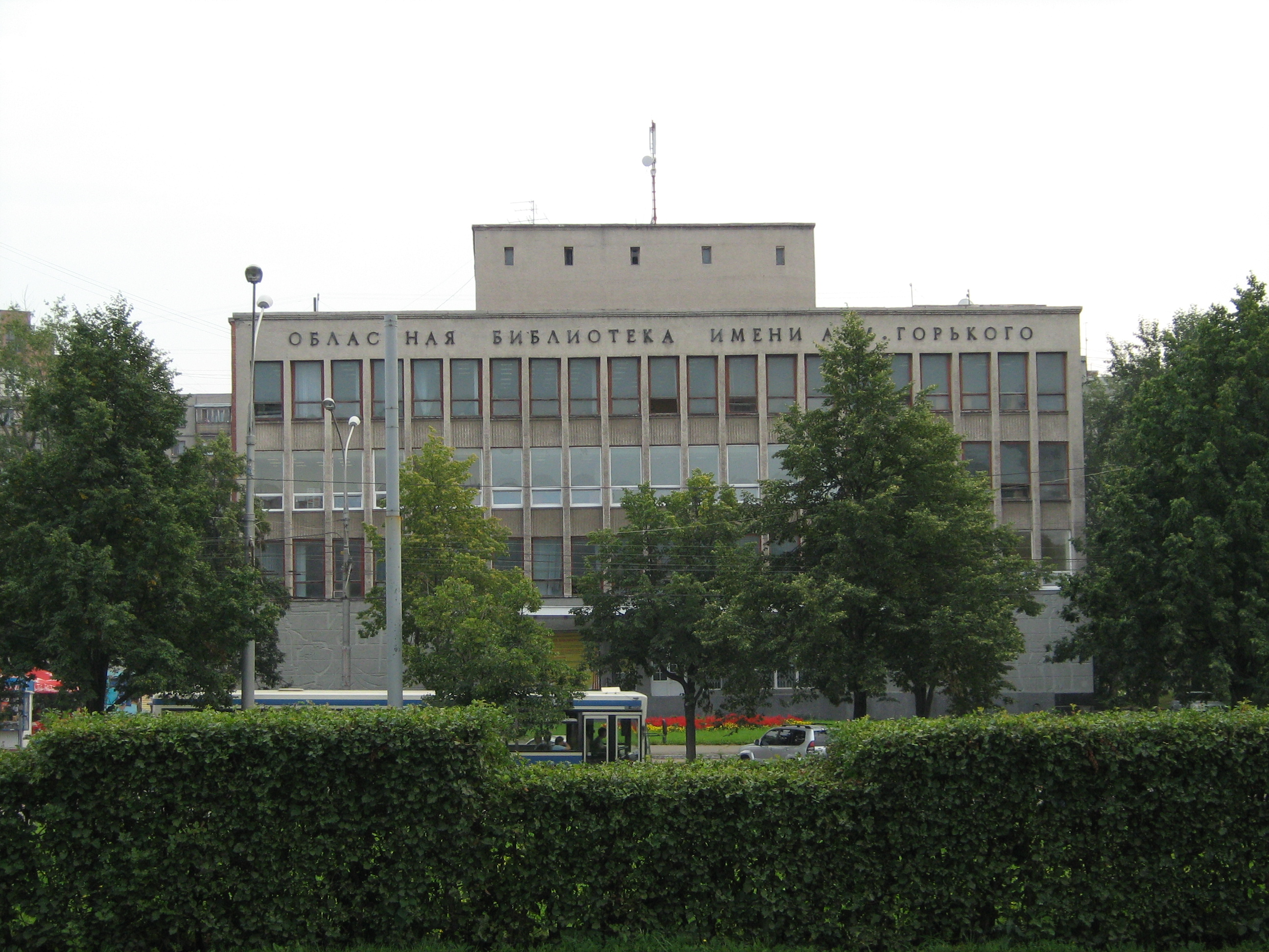 Пермская государственная краевая универсальная библиотека им. А. М. Горького